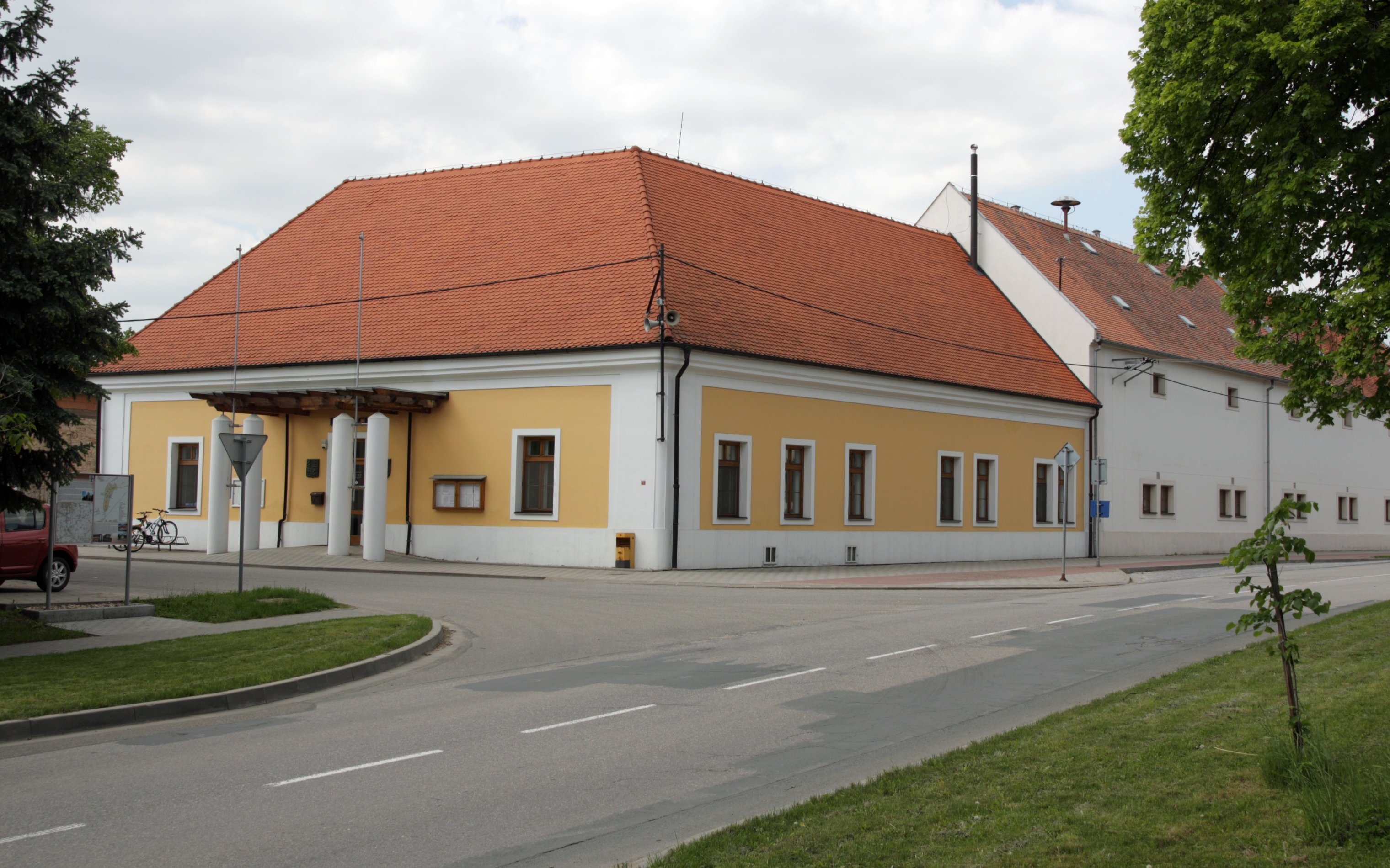 Měnín - radnice